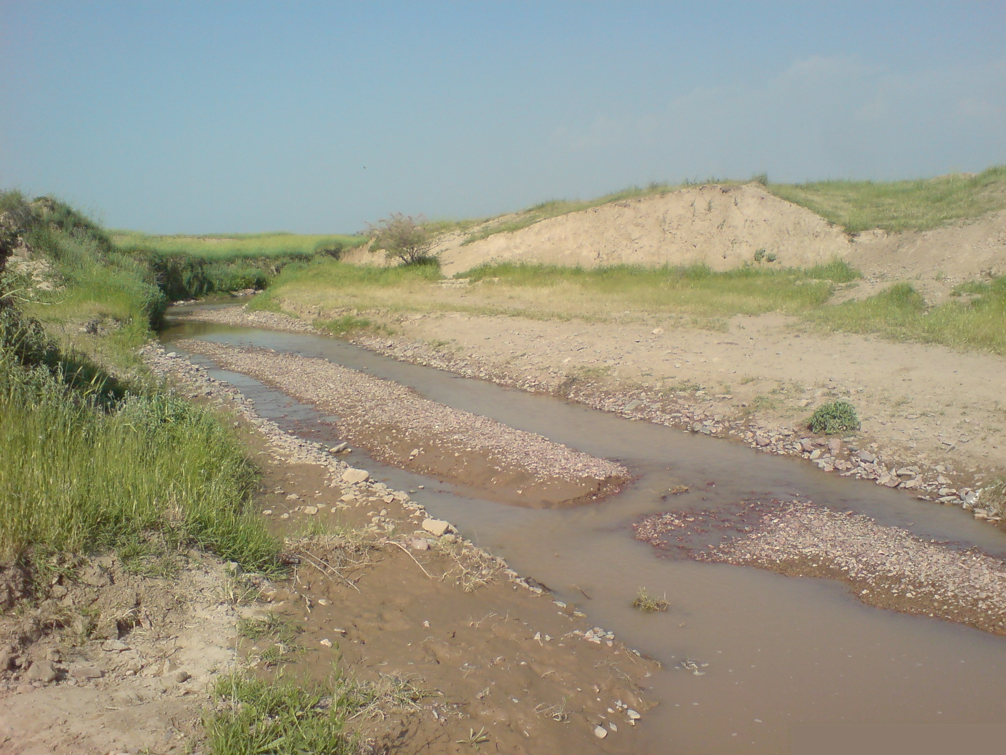 Река Беляутсай в нижнем течении, Узбекистан, Ташкентский вилоят